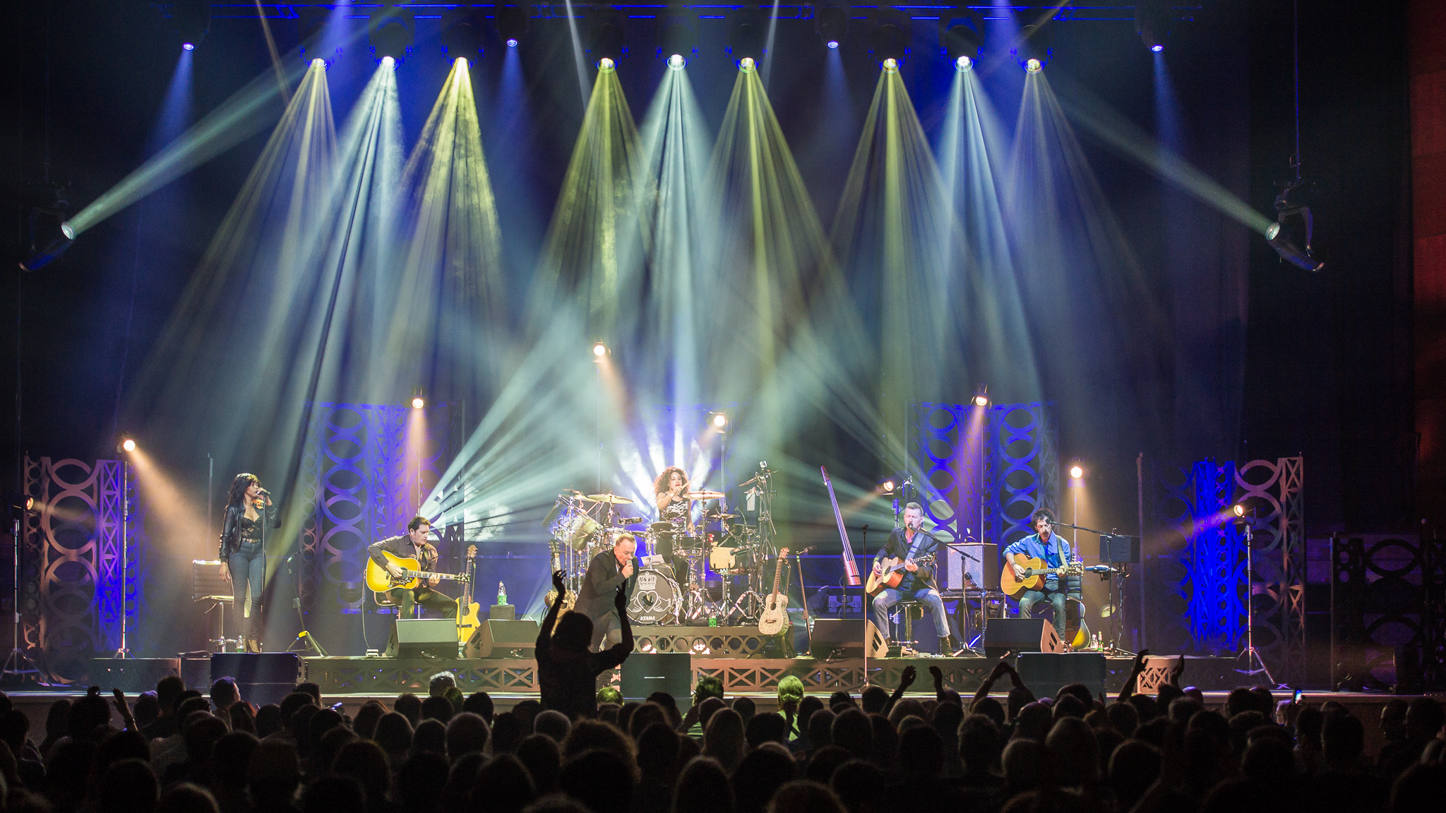 Acoustic Live Tour,Concertbüro Franken,Konzert,Livekonzert,Livemusik,Meistersingerhalle,Simple Minds